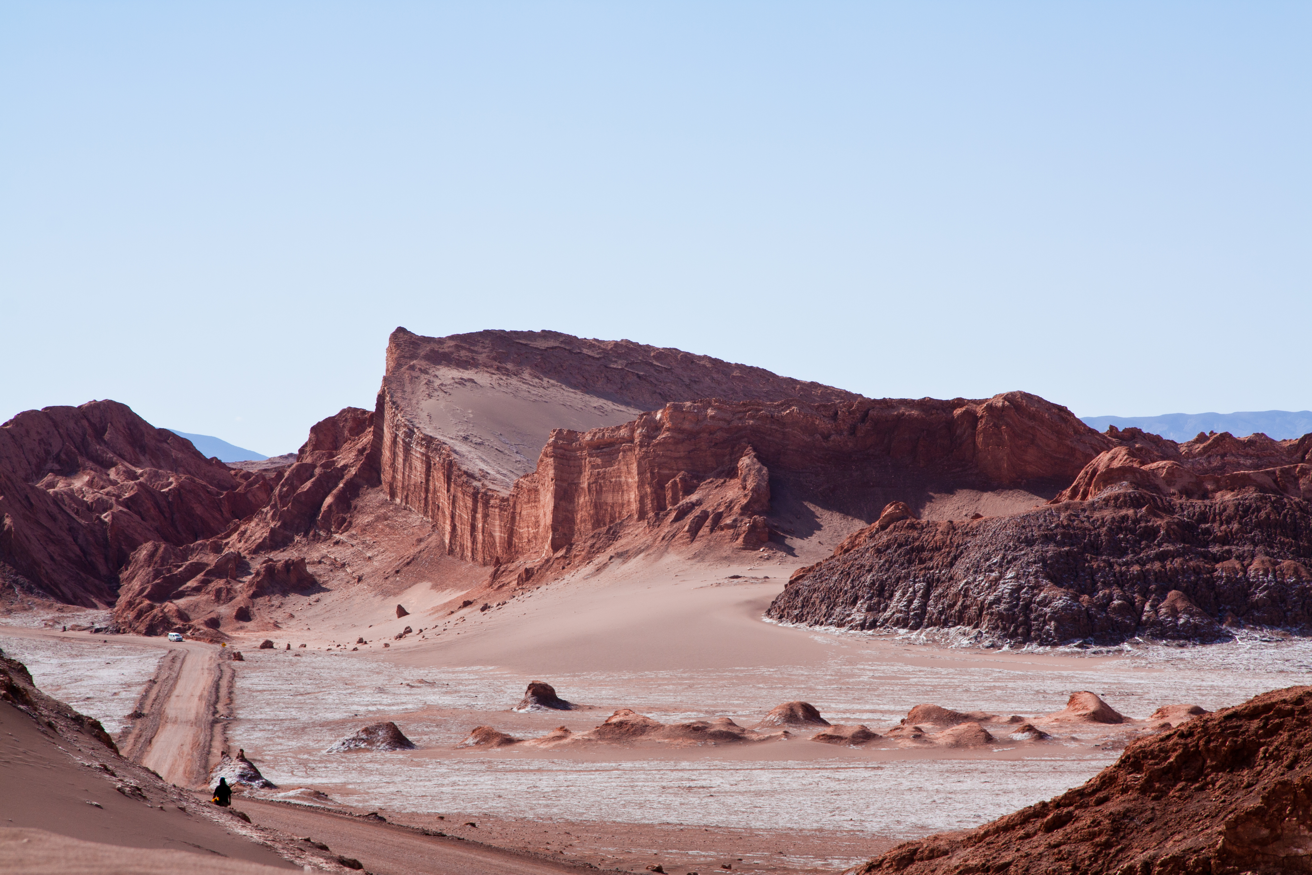 Valle de la Luna This is a photo of a national monument in Chile: 544